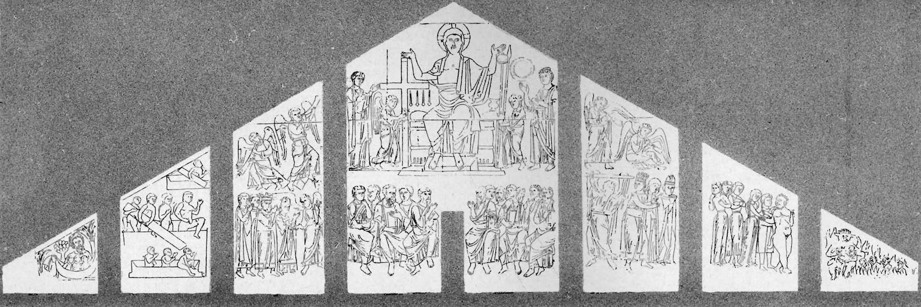 Graffito sulla facciata della chiesa di San Zeno